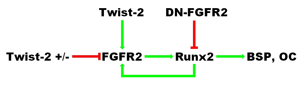 Esquema proposat dels factors que s'activen i regulen alhora twist2